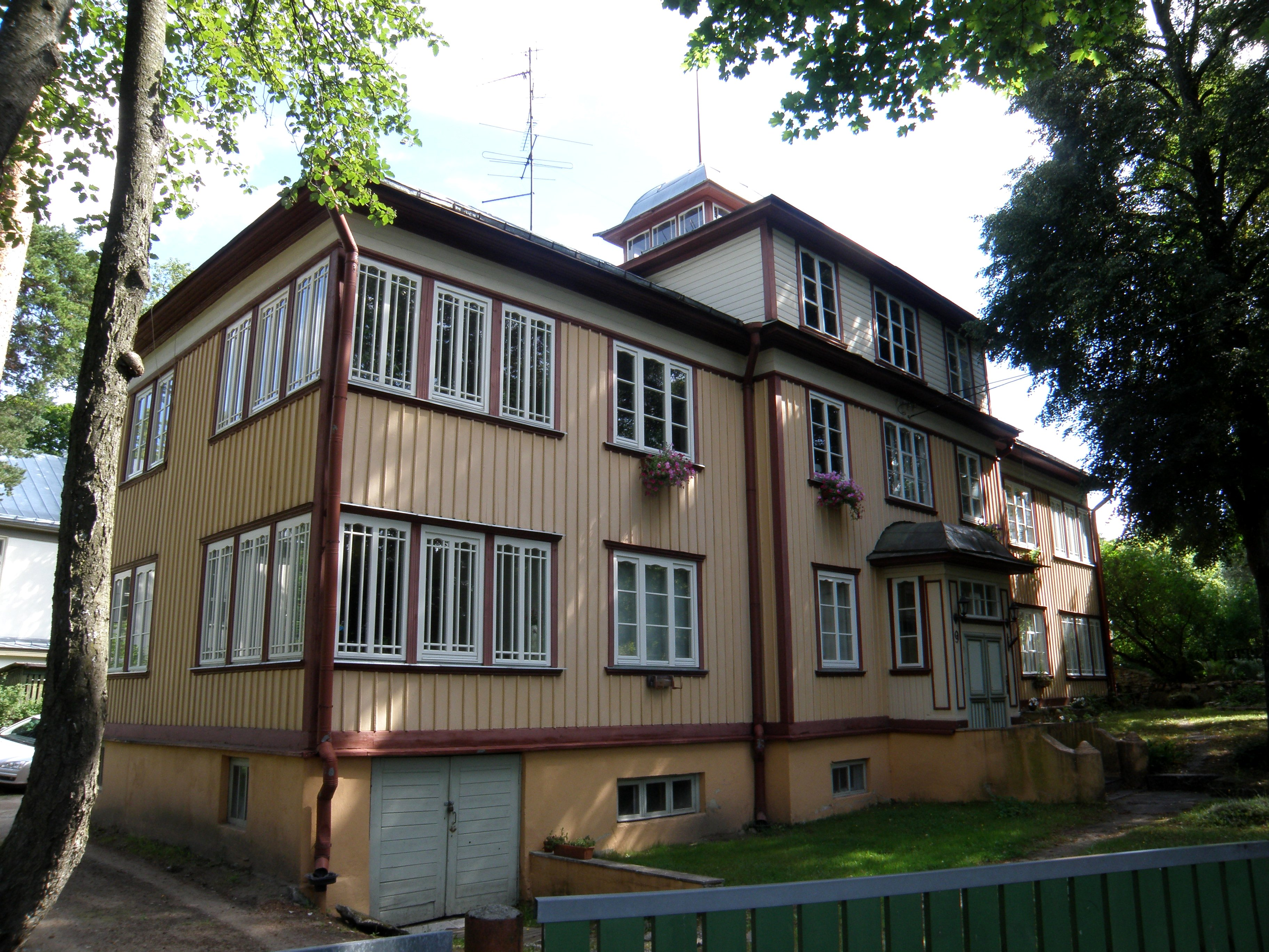 Elamu Valdeku 9